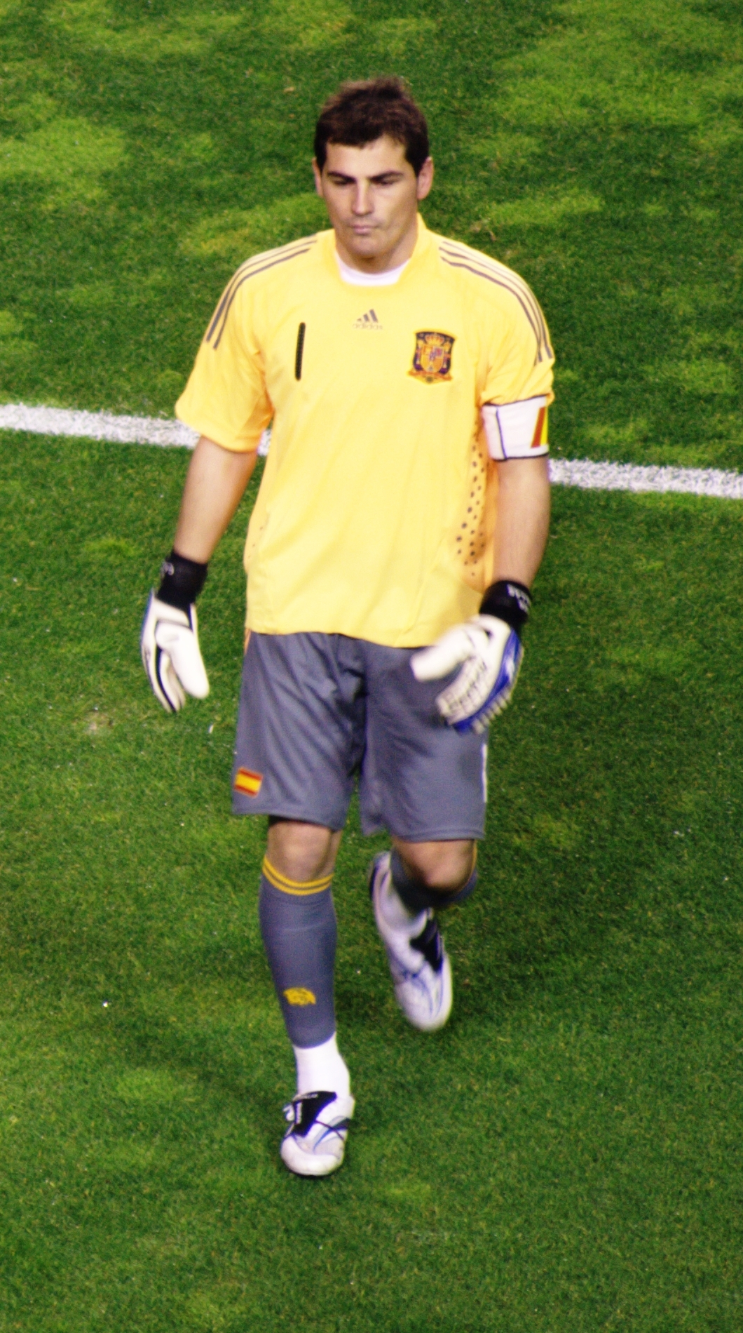 Versión recortada. Iker Casillas en un partido amistoso contra la selección de Inglaterra.